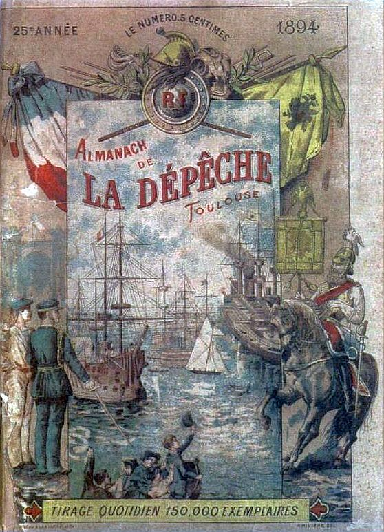 Almanach de La Dépêche de Toulouse, édité en 1894 - bibliothèque muniipale de Toulouse, numérisation 74899/B315556101_AUTA_2000-12_018.